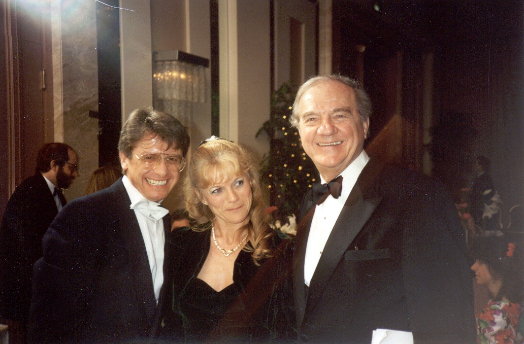 Erich Fitz mit Frau Waltraud Fitz bei der Preisverleihung des Oscars